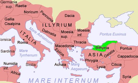 antiqua romani imperii prouincia. author: mschus